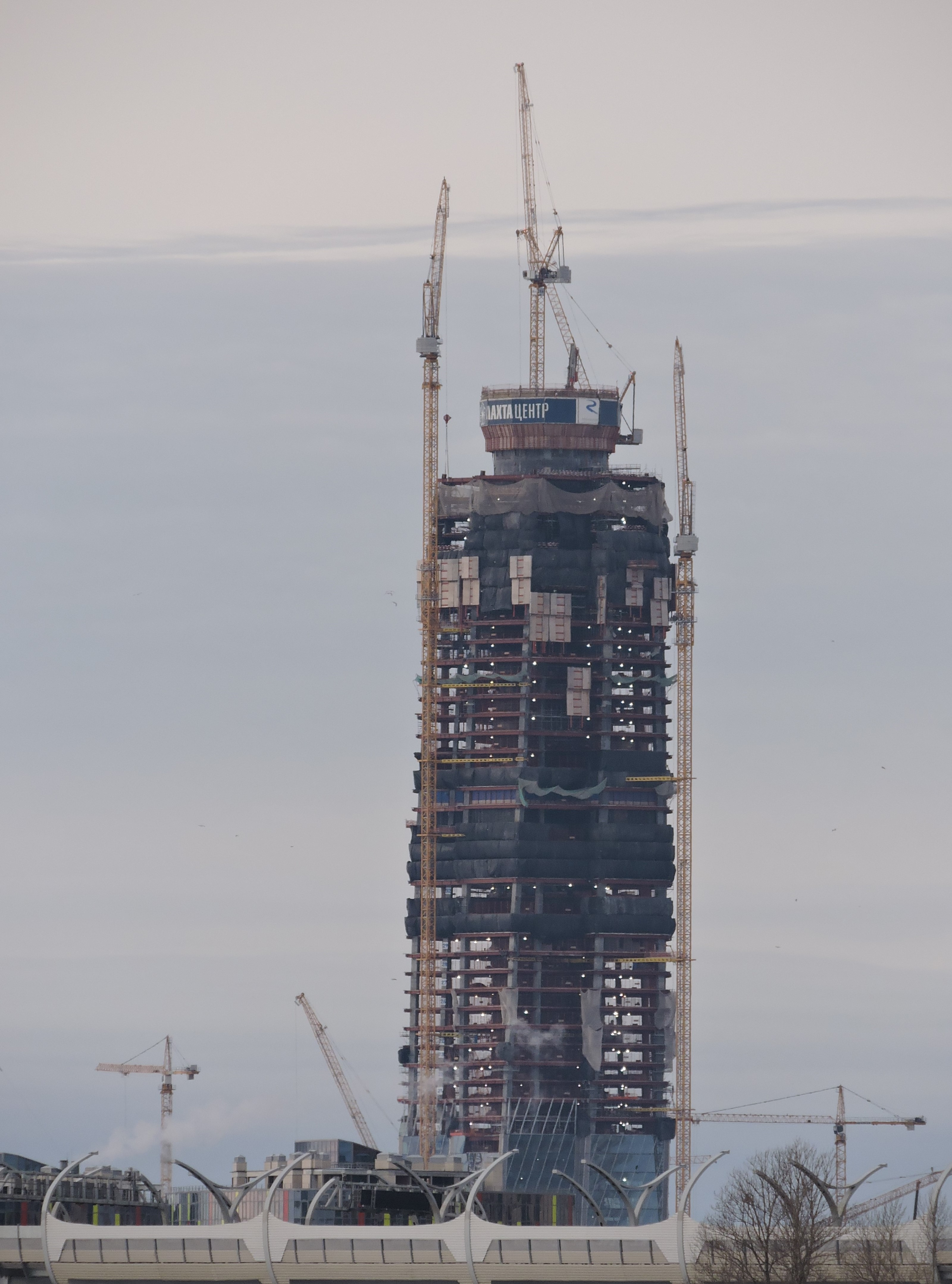 Лахта-центр (декабрь 2016). 245 метров